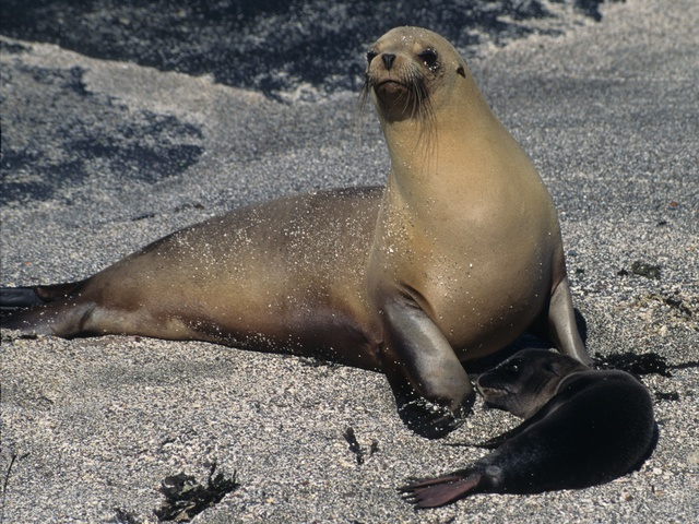 Galápagos Sea Lion (Zalophus wollebaeki) Photos taken during a 10 day trip to Galapagos.